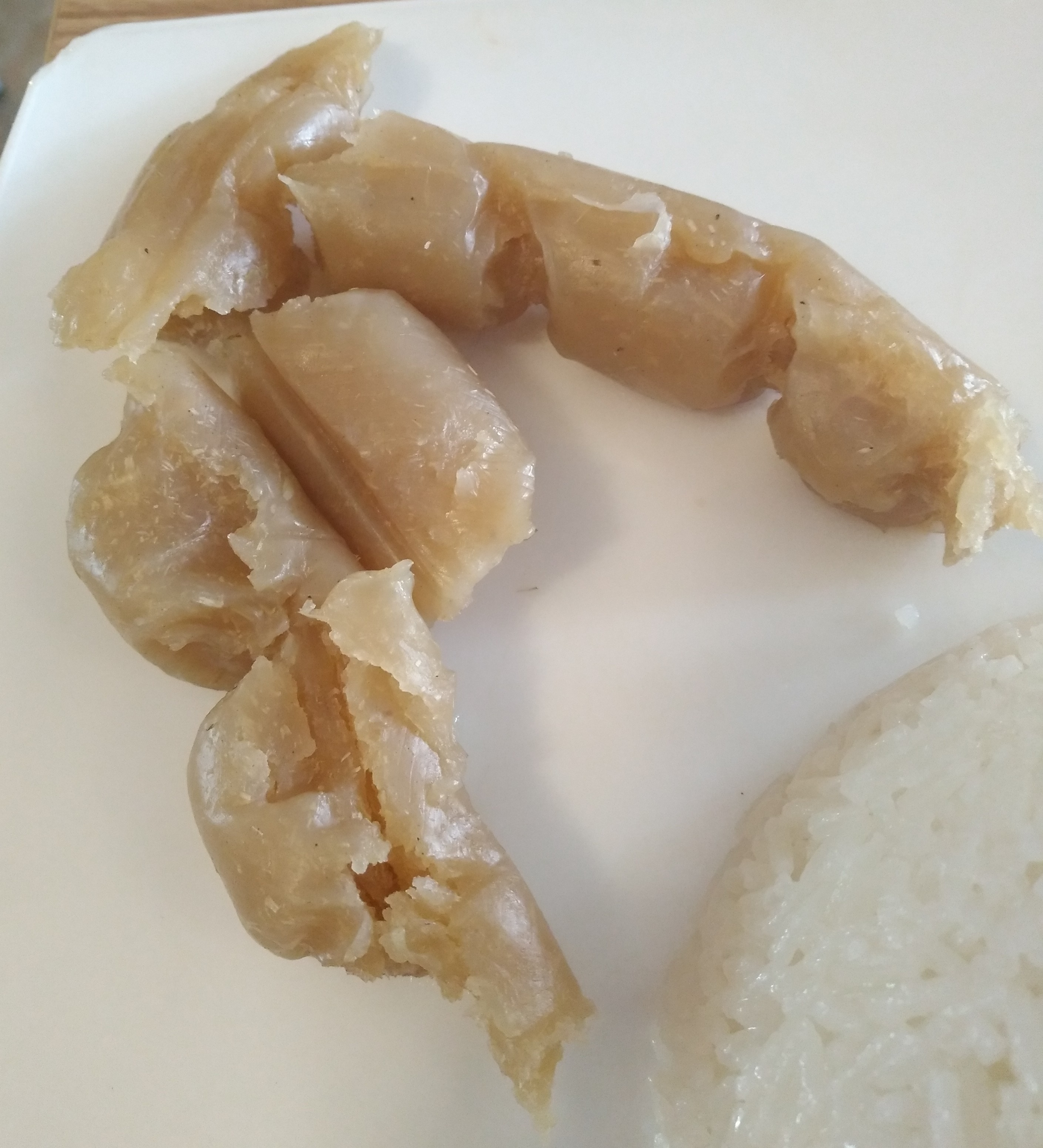 Du bobolo, servi dans le restaurant Africana, dans le 7e arrondissement de Lyon.